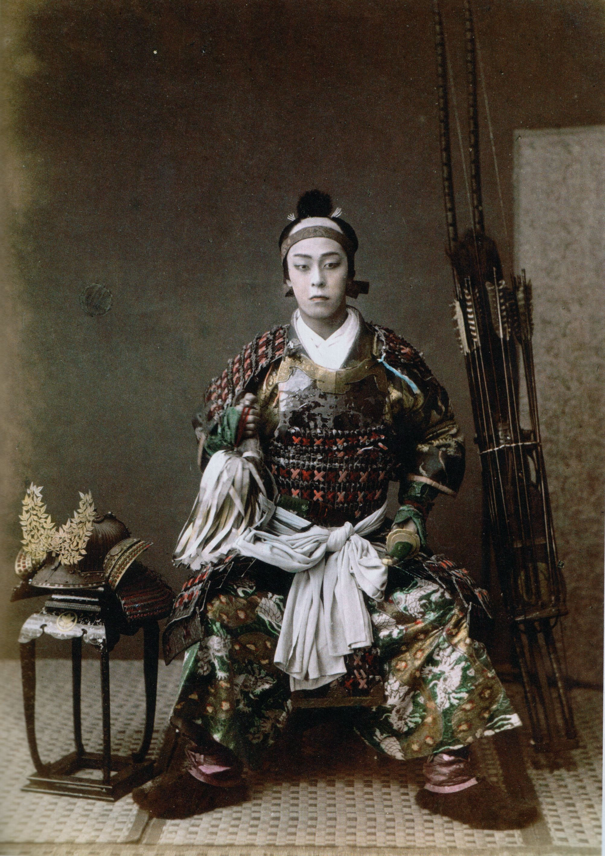 Archer japonais. Photographie prise en 1867 par Felice Beato.